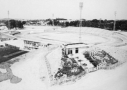 L'ancien Stade Richter de Montpellier